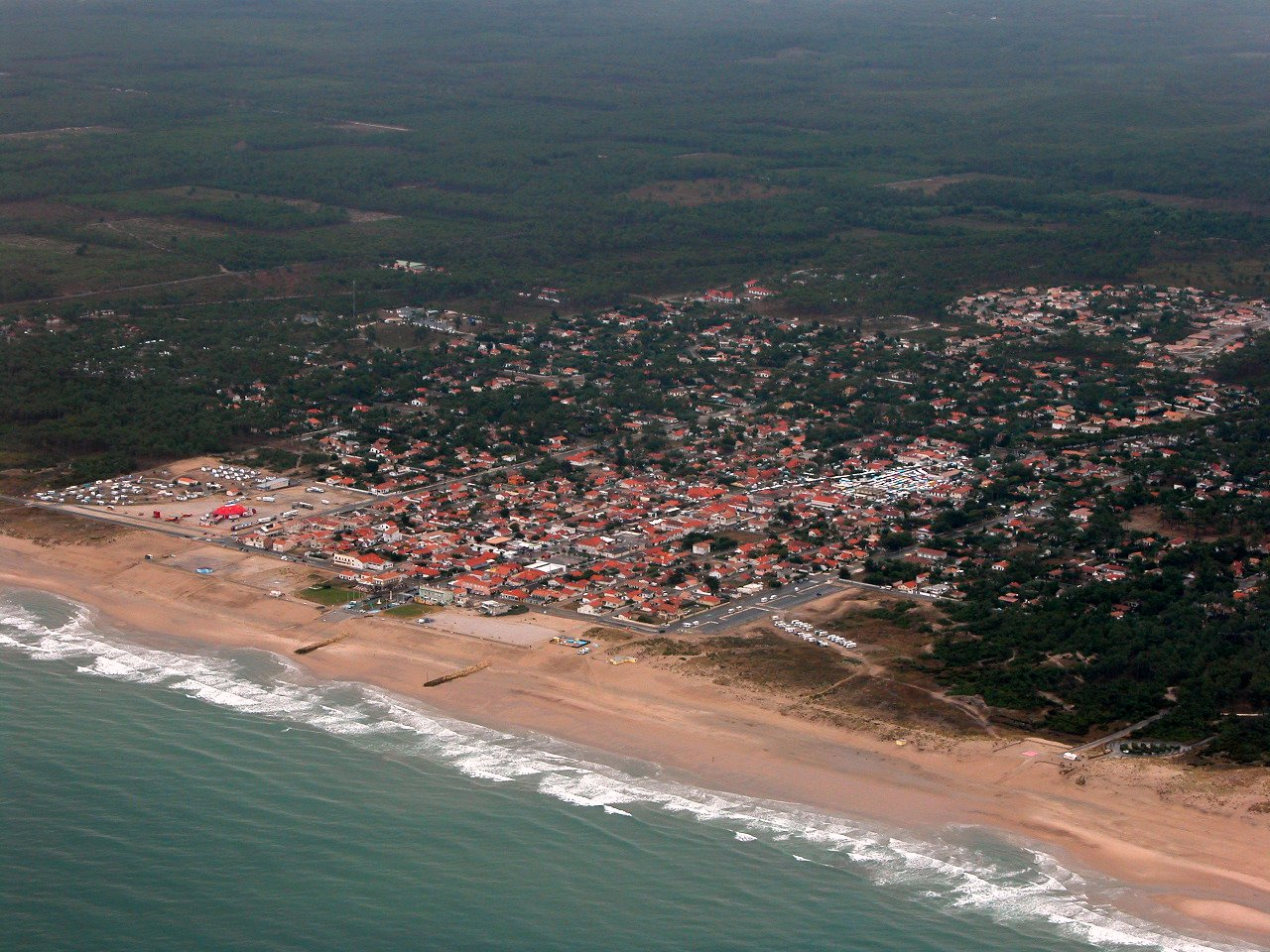 Photo personnelle, vue aérienne de Montalivet, été 2005.